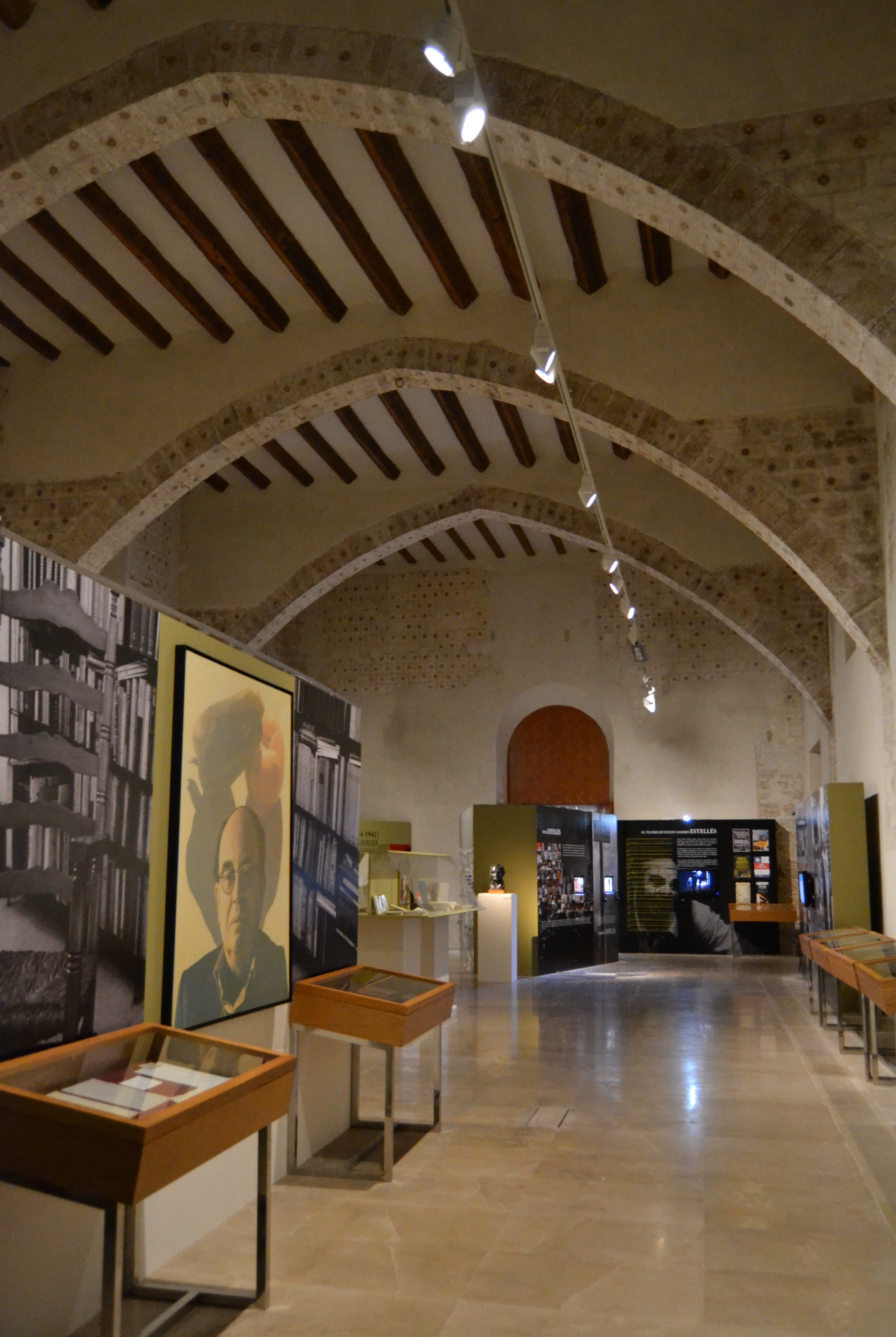 Refectori del convent del Carme, exposició de Vicent Andrés Estellés.